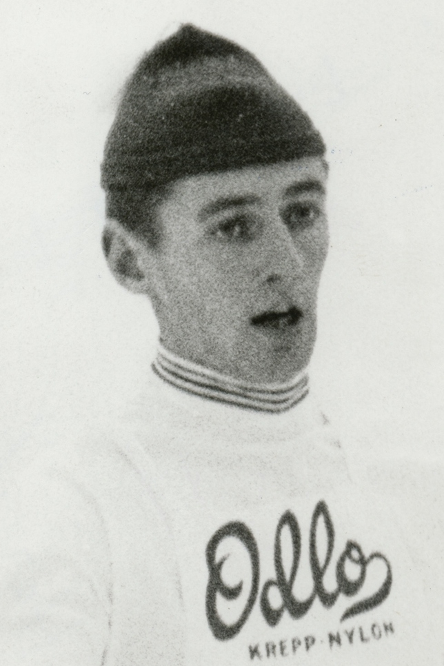 Johs Harviken